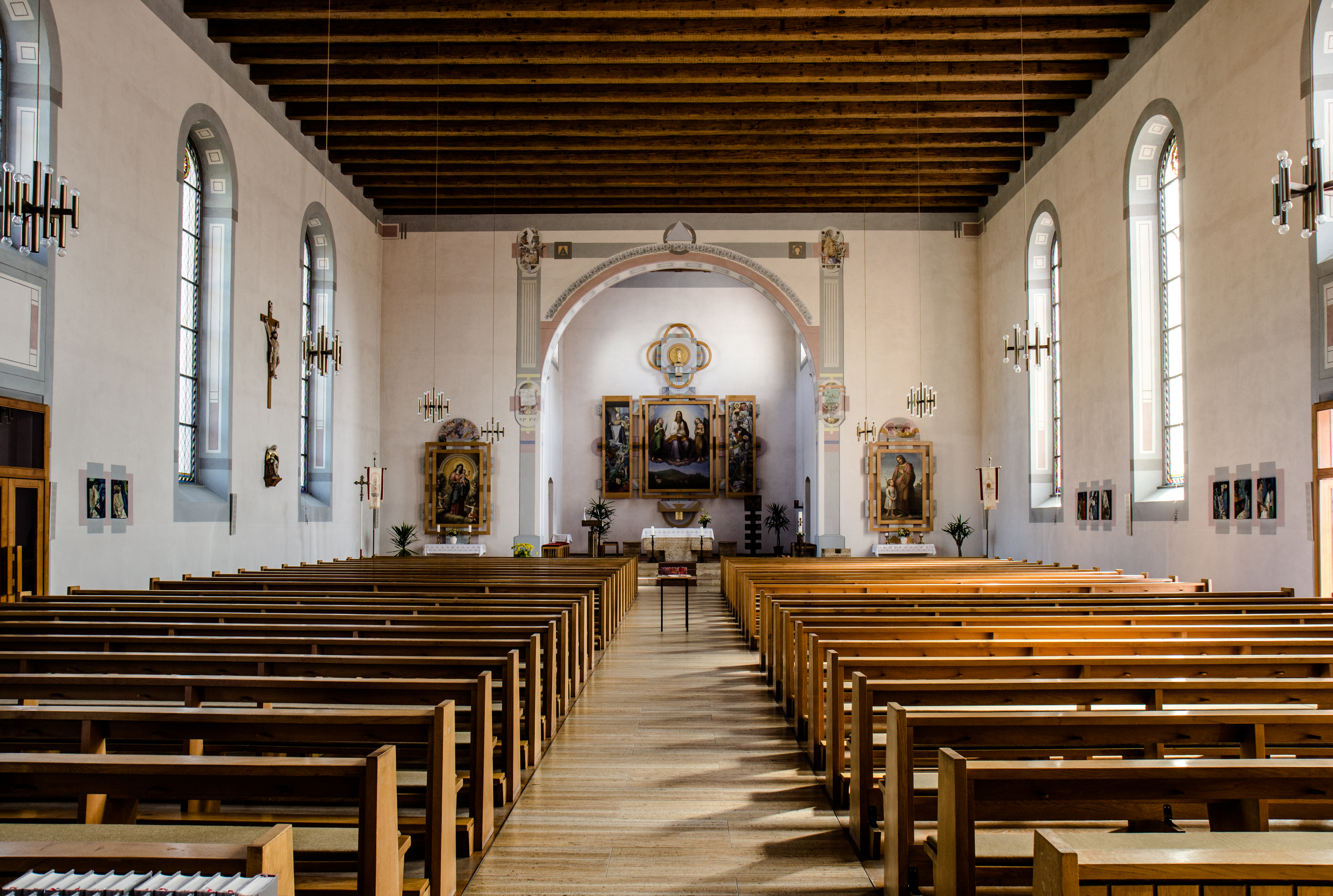 St. Bartholomäus (Ortenberg)